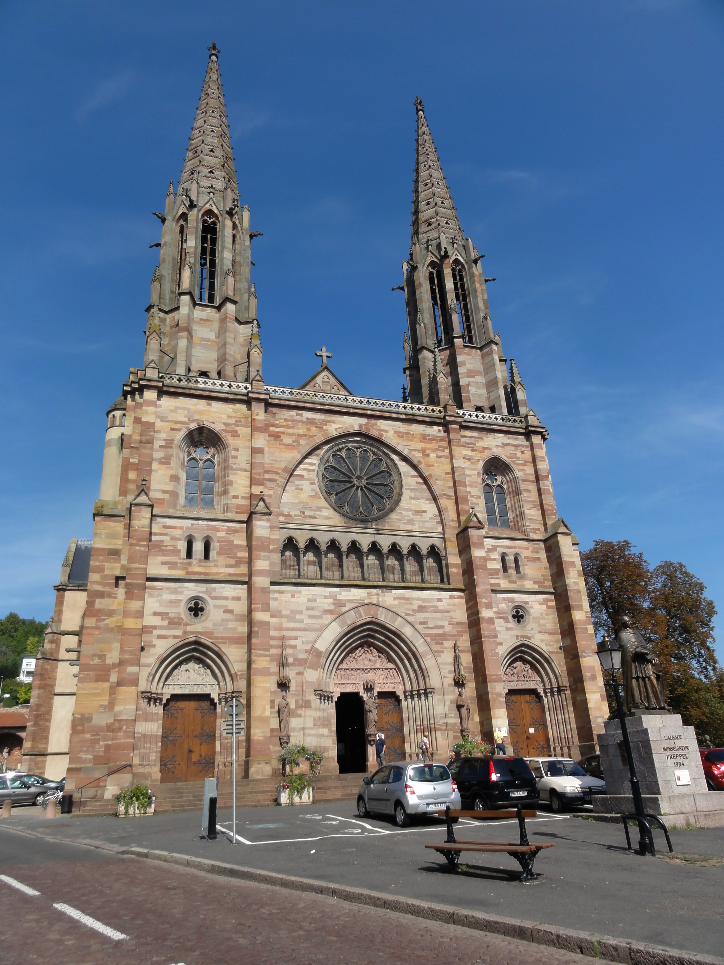 Alsace, Bas-Rhin, Obernai, Église Saints-Pierre-et-Paul (PA00084850, IA00023930): Façade occidentale.